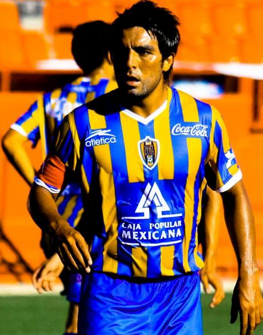 copa tijuana 2011 disputada en el estadio caliente de tijuana entre monterrey, xolos, san luis y puebla Mas informacion fotos y videos en